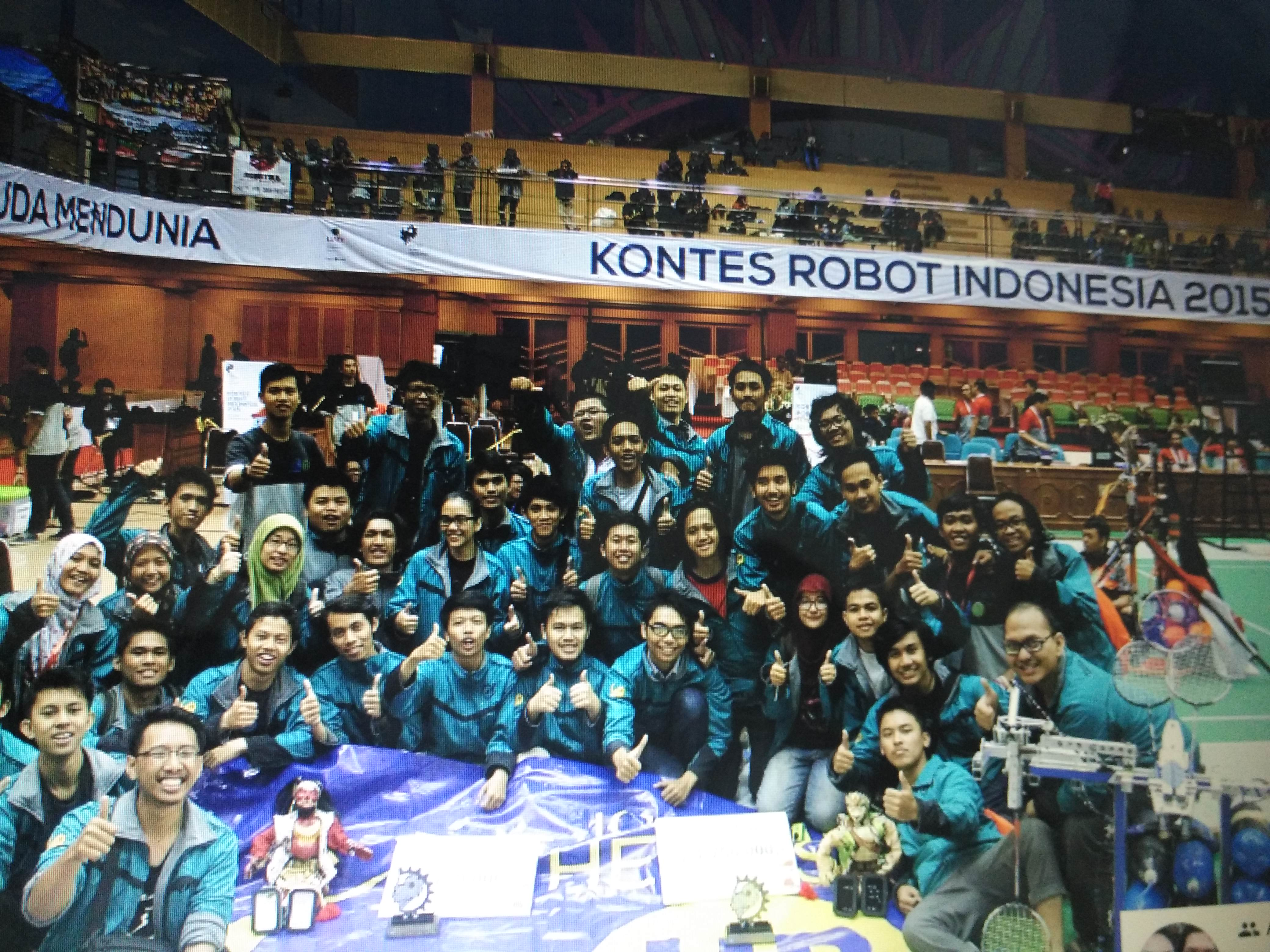 foto tim robot ub 2015